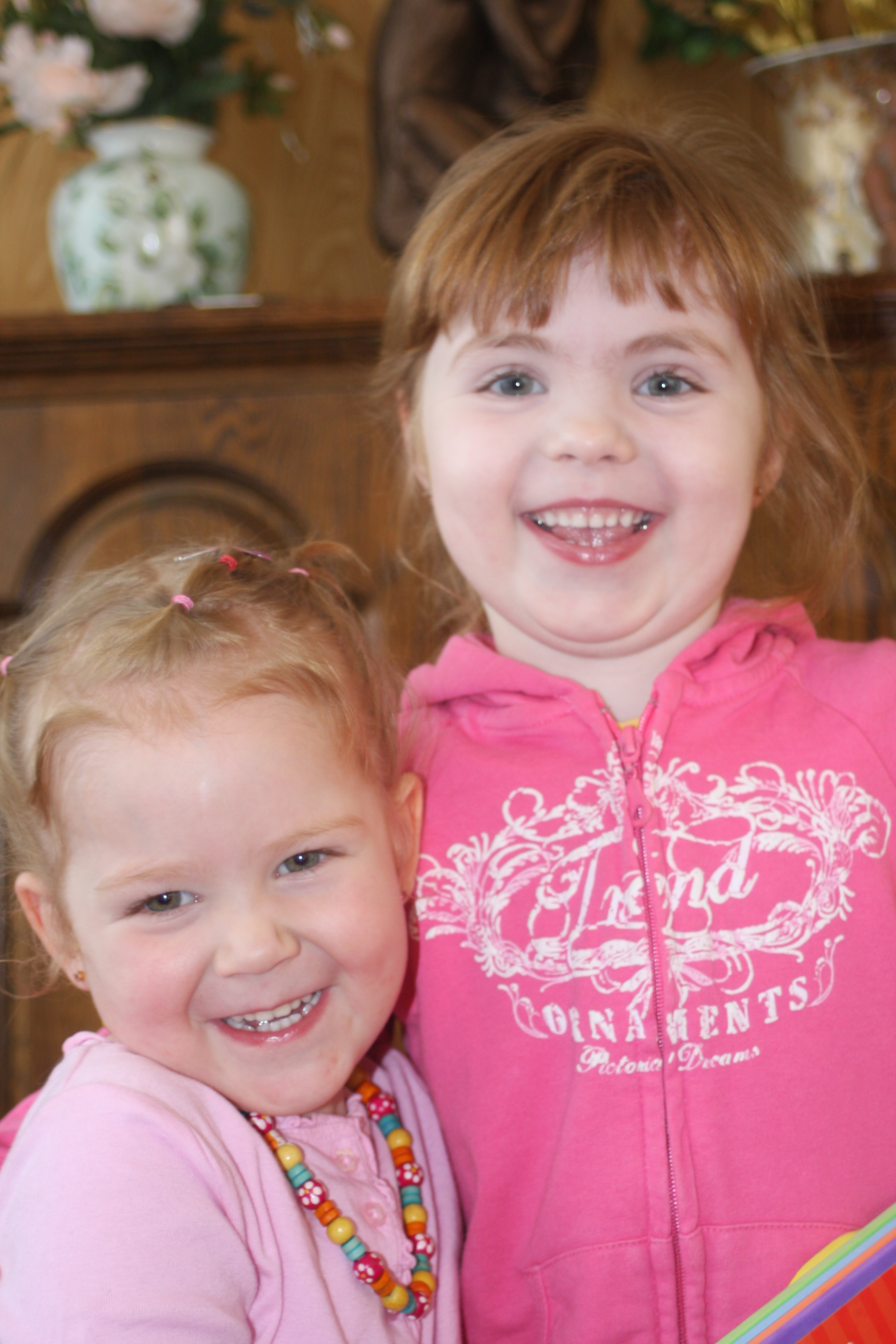 fun